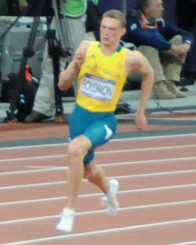 Finale du 400m hommes des jeux olympiques de Londres, 2012, Steven Solomon